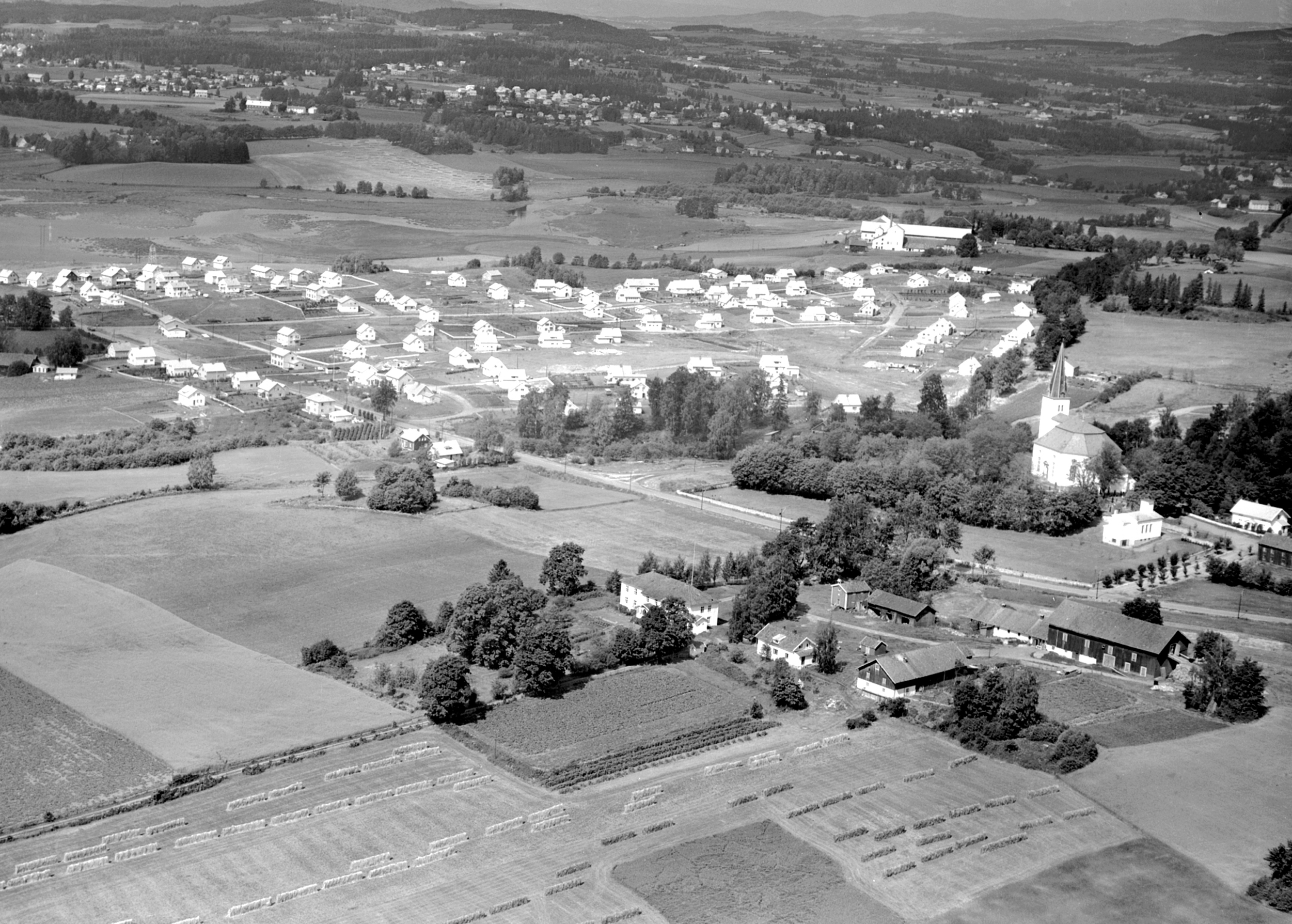 Flyfoto av Vang kirkegård og kirke i Ridabu, 1956. Ukjent fotograf for Widerøe Flyveselskap. Fra Domkirkeoddens fotoarkiv i Digitalt museum